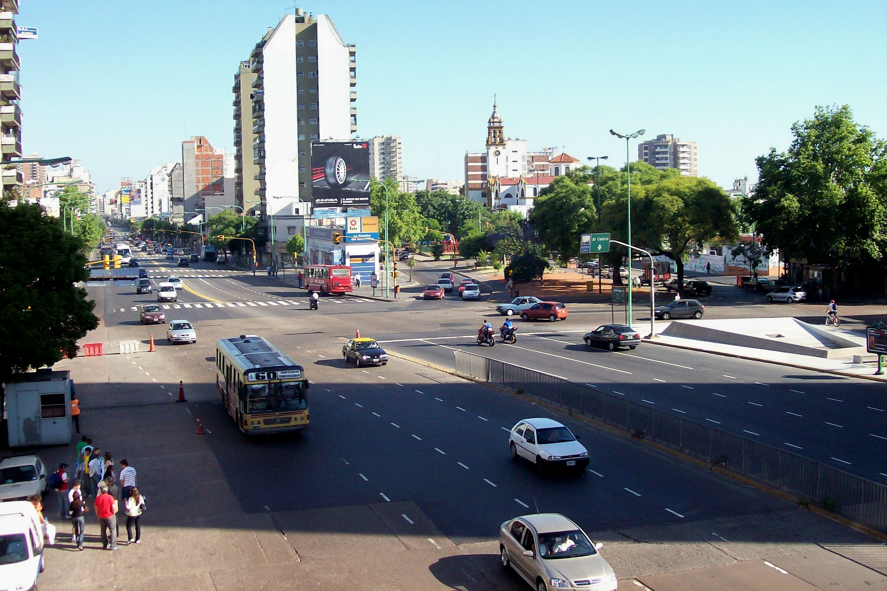 Unión de Av. Cabildo (izq) con Av. San Isidro (la diagonal) e intersección con calle Vedia (la perpendicular), en la Ciudad de Buenos Aires. Tomada desde el puente de la Av. Gral Paz (popularmente conocido por "puente Saavedra") en dirección N a S